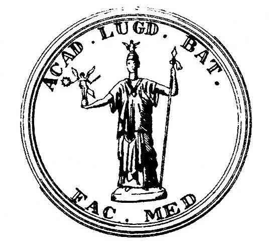 Sigillum Maior Facultas Medica Academiae Lugduno Batavae